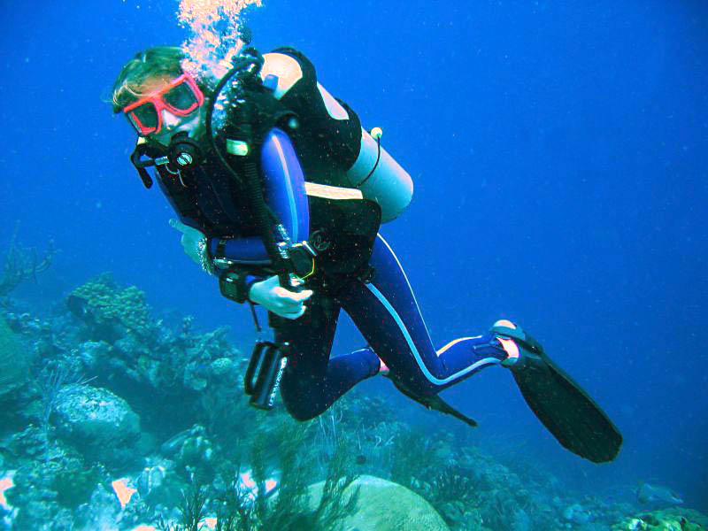 Hobbytaucherin (Original text: Hobbytaucherin vor Bonaire in der Karibik.)